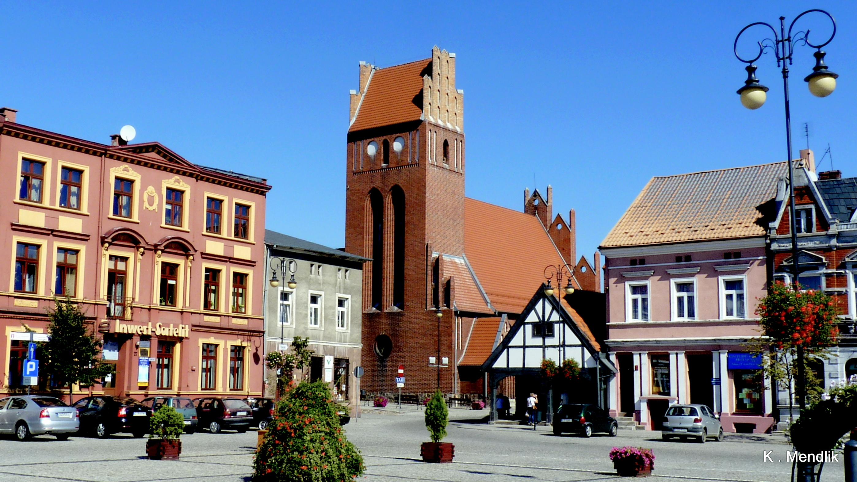 Golub-Dobrzyń, Polska - widok dawnego kościoła ewangelickiego , obecnie mieści się tam szkoła